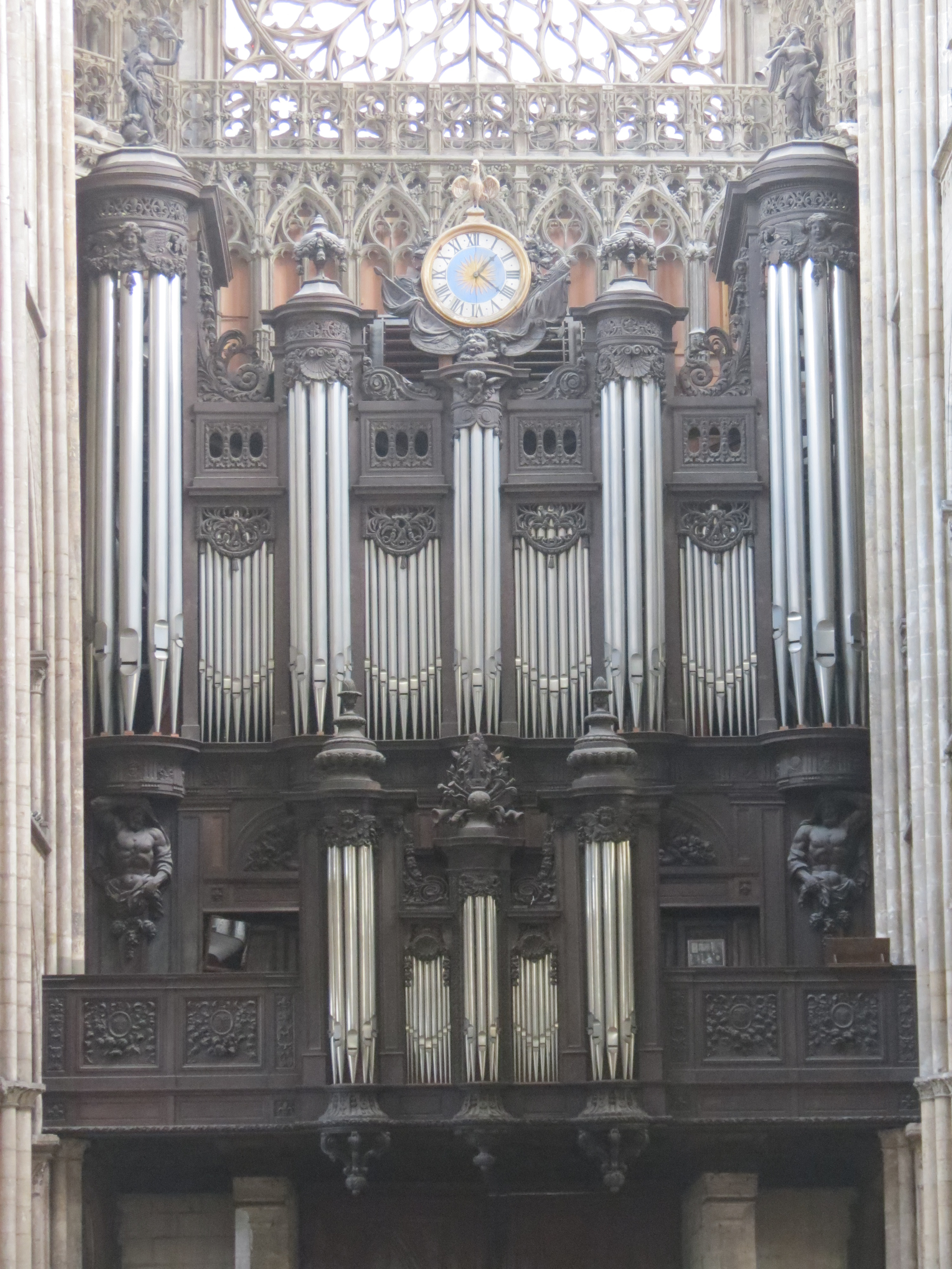 Grand orgue et buffet.